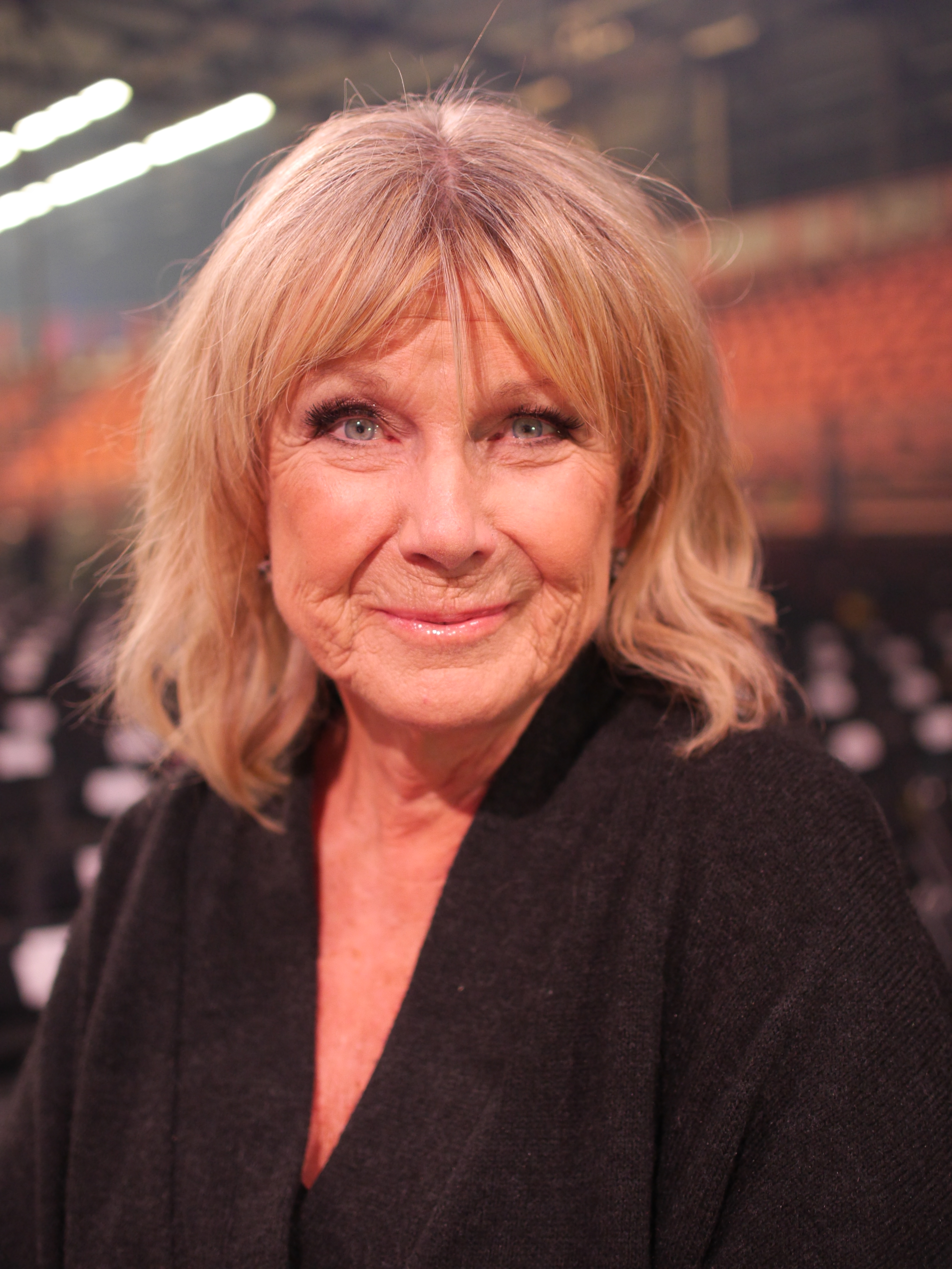 Melodifestivalen 2019 i Lidköping